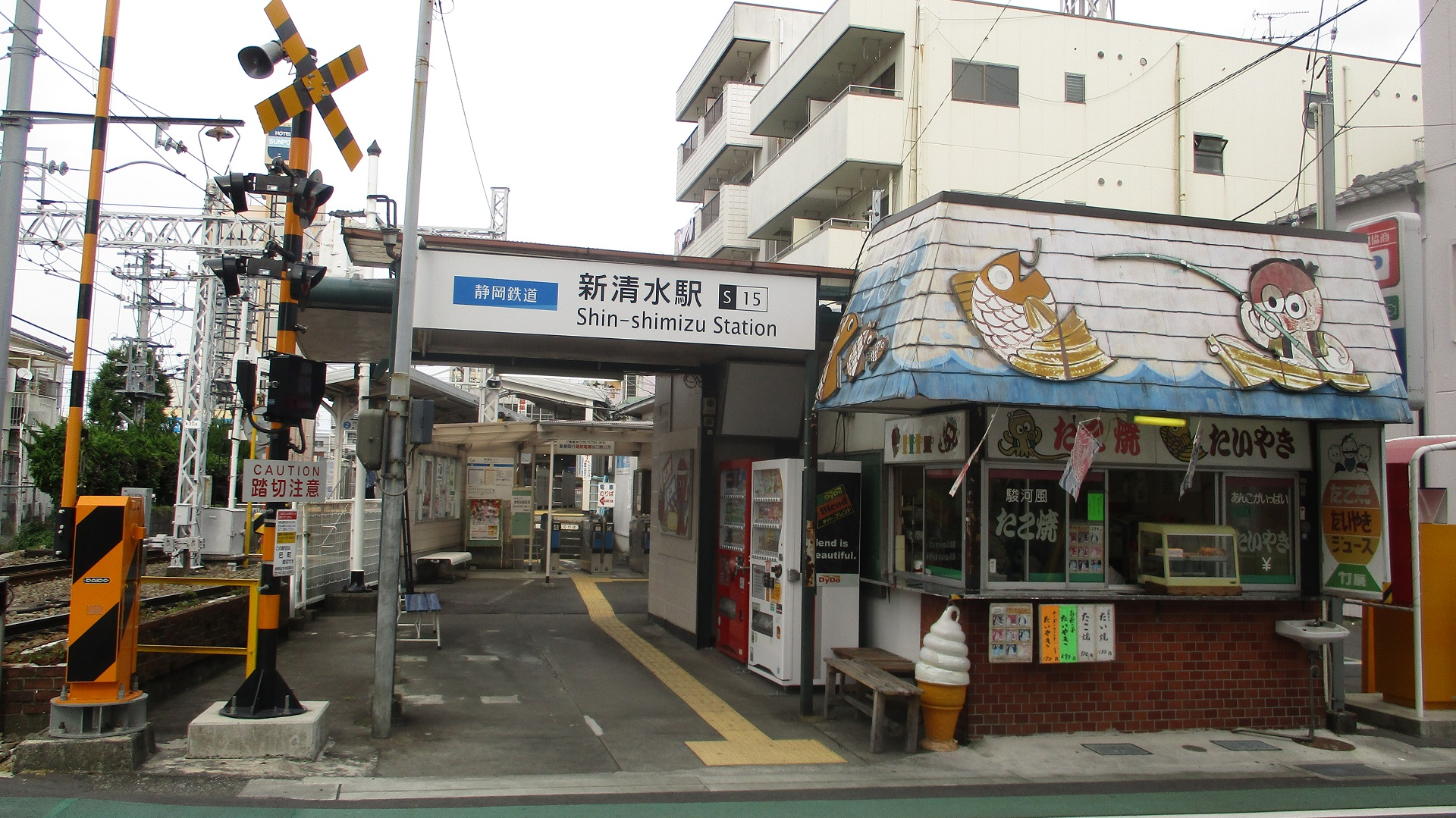 新清水駅(巴川口)の駅舎